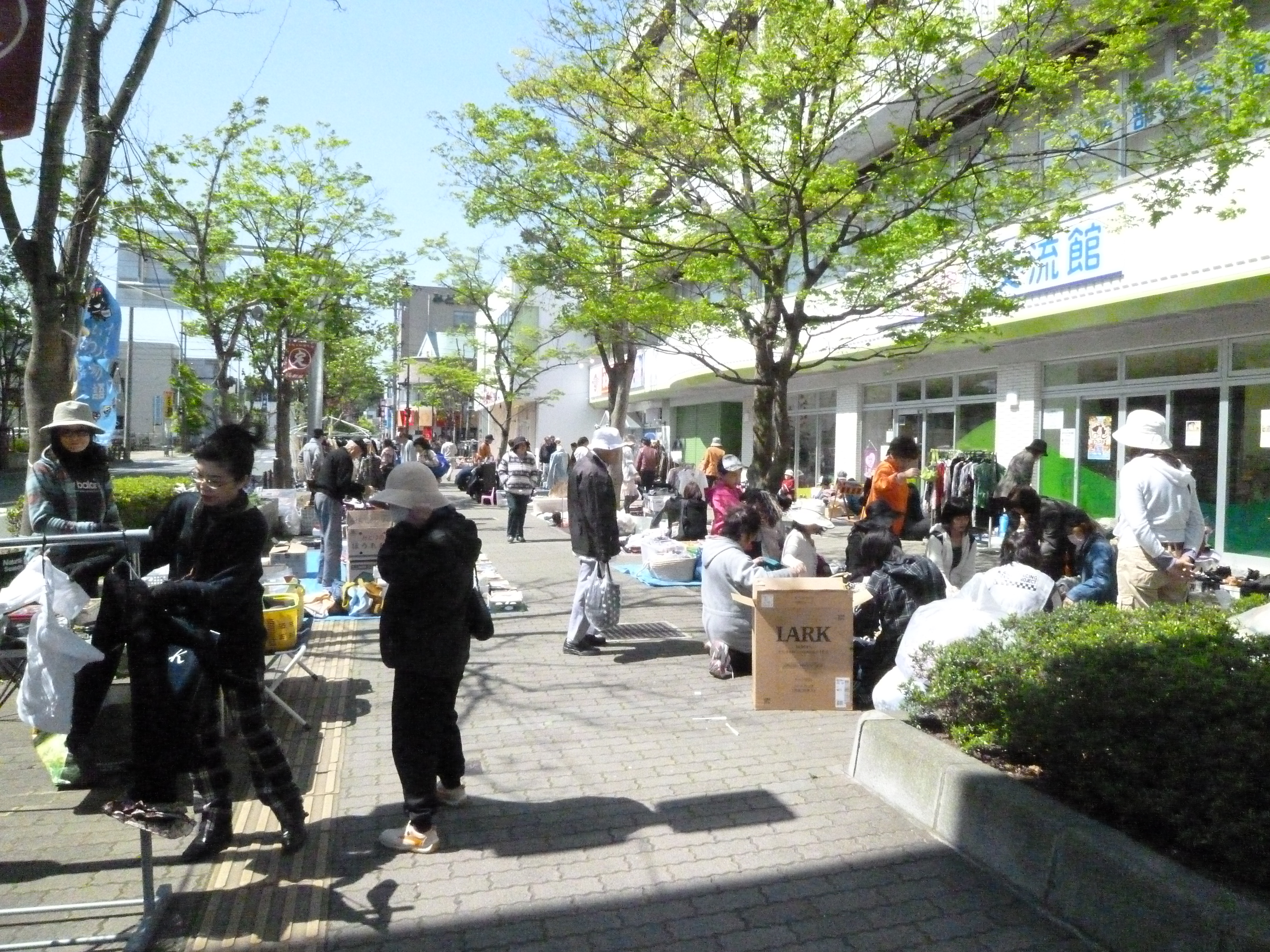 西館前でのフリーマーケット